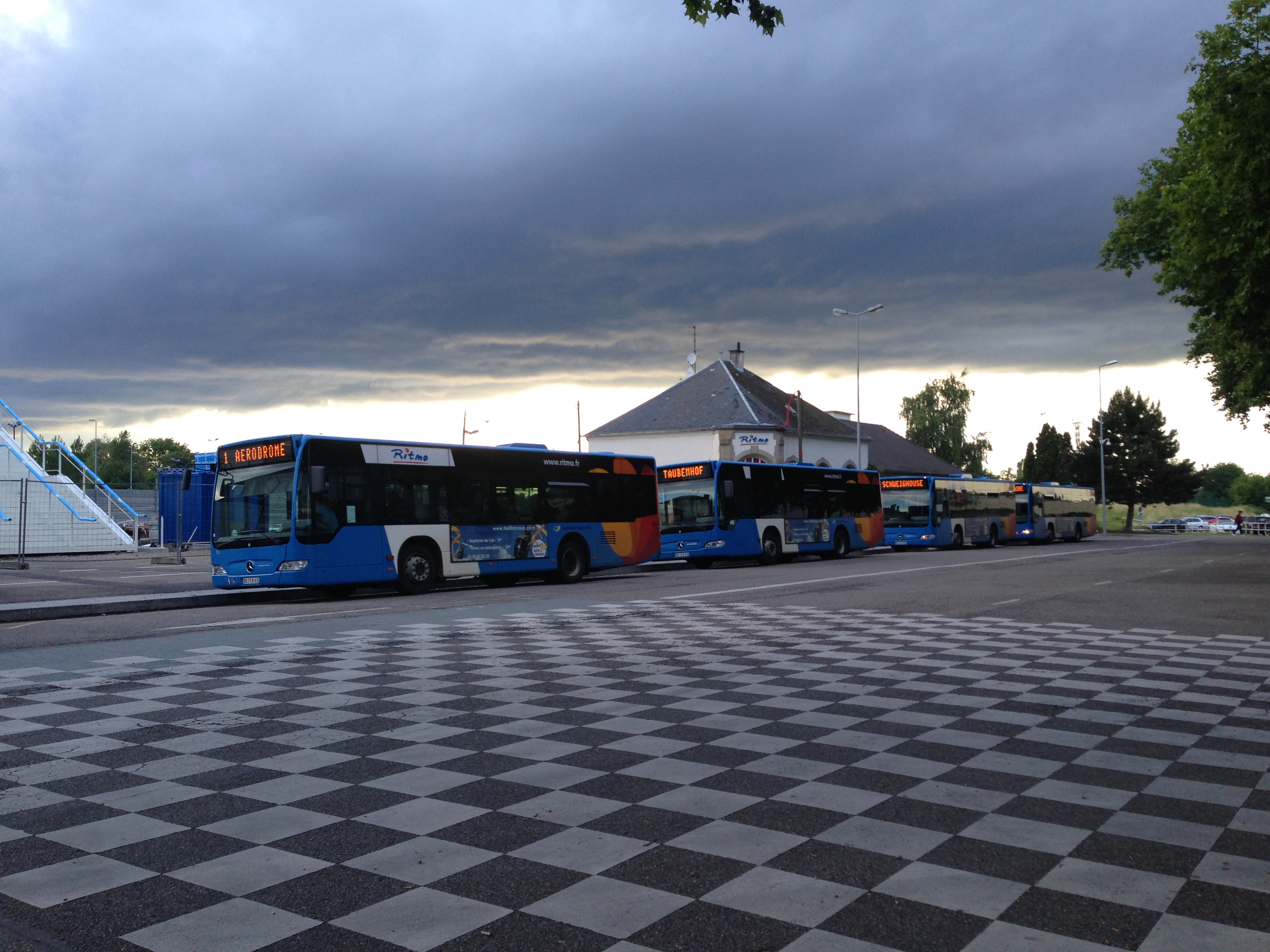 Les bus à Haguenau